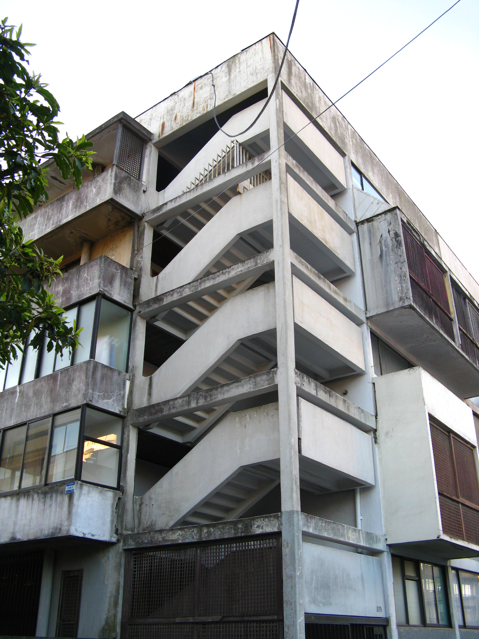 Escaleras del Edificio Arauco Concepción, Chile Julio de 2012